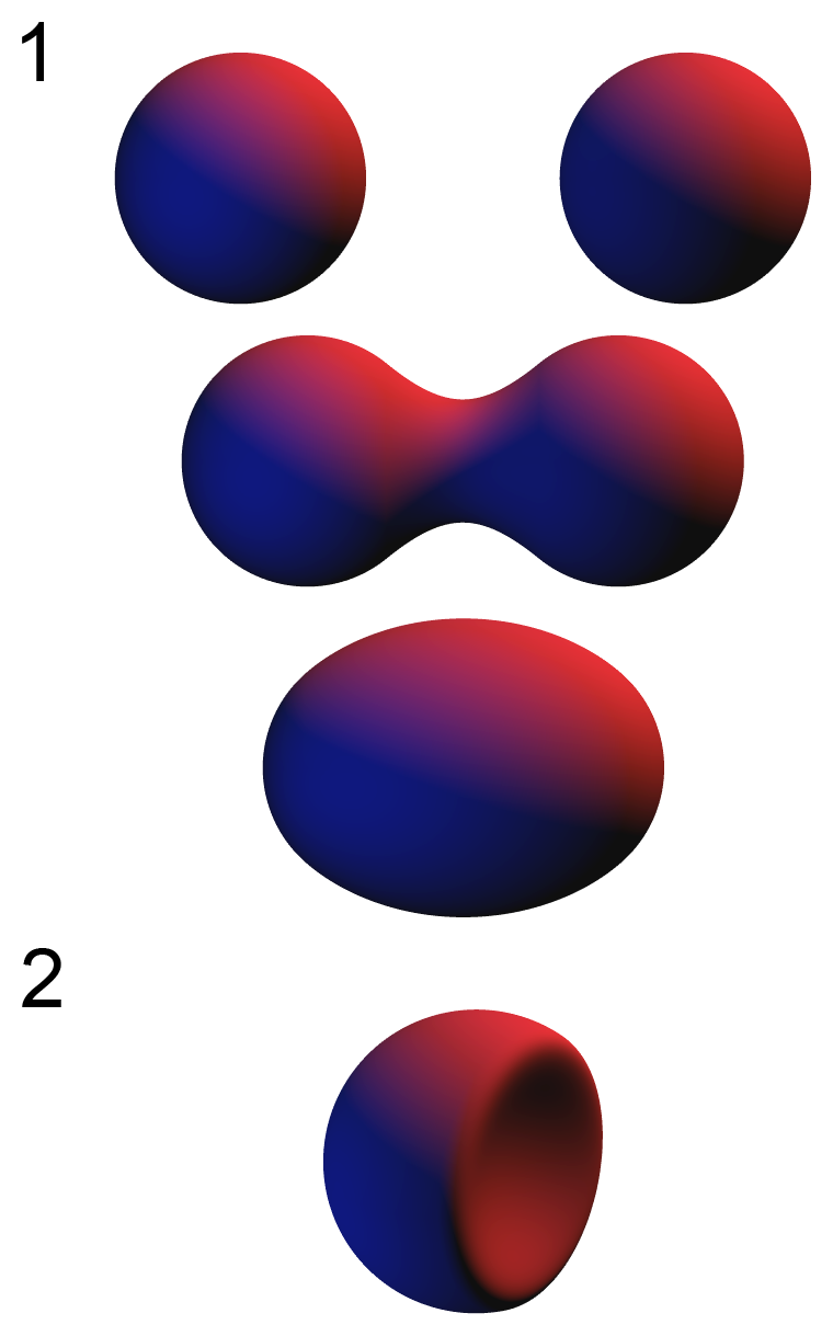 Example for Metaballs.